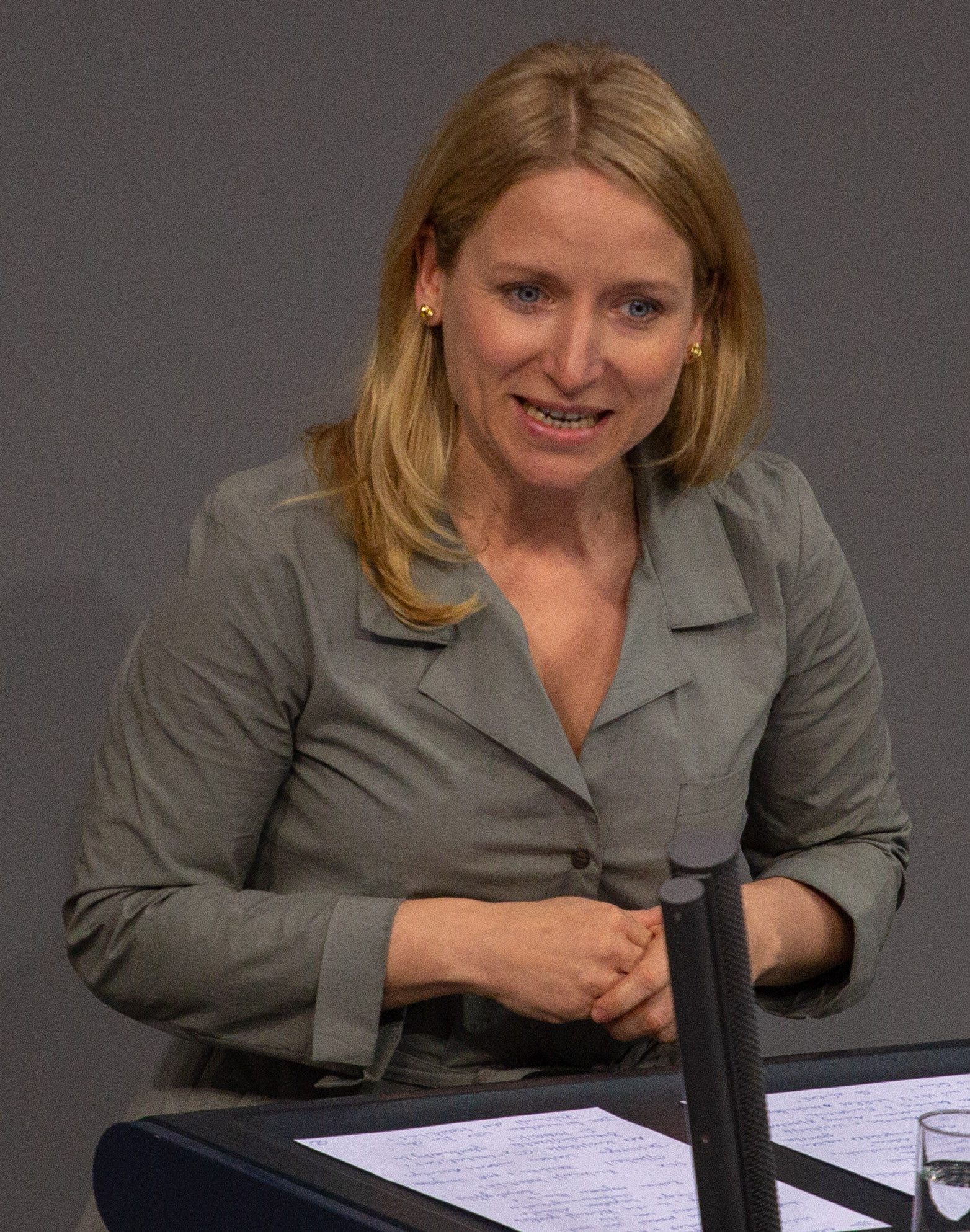 Daniela Kluckert, Mitglied des Deutschen Bundestages, während einer Plenarsitzung am 11. April 2019 in Berlin.